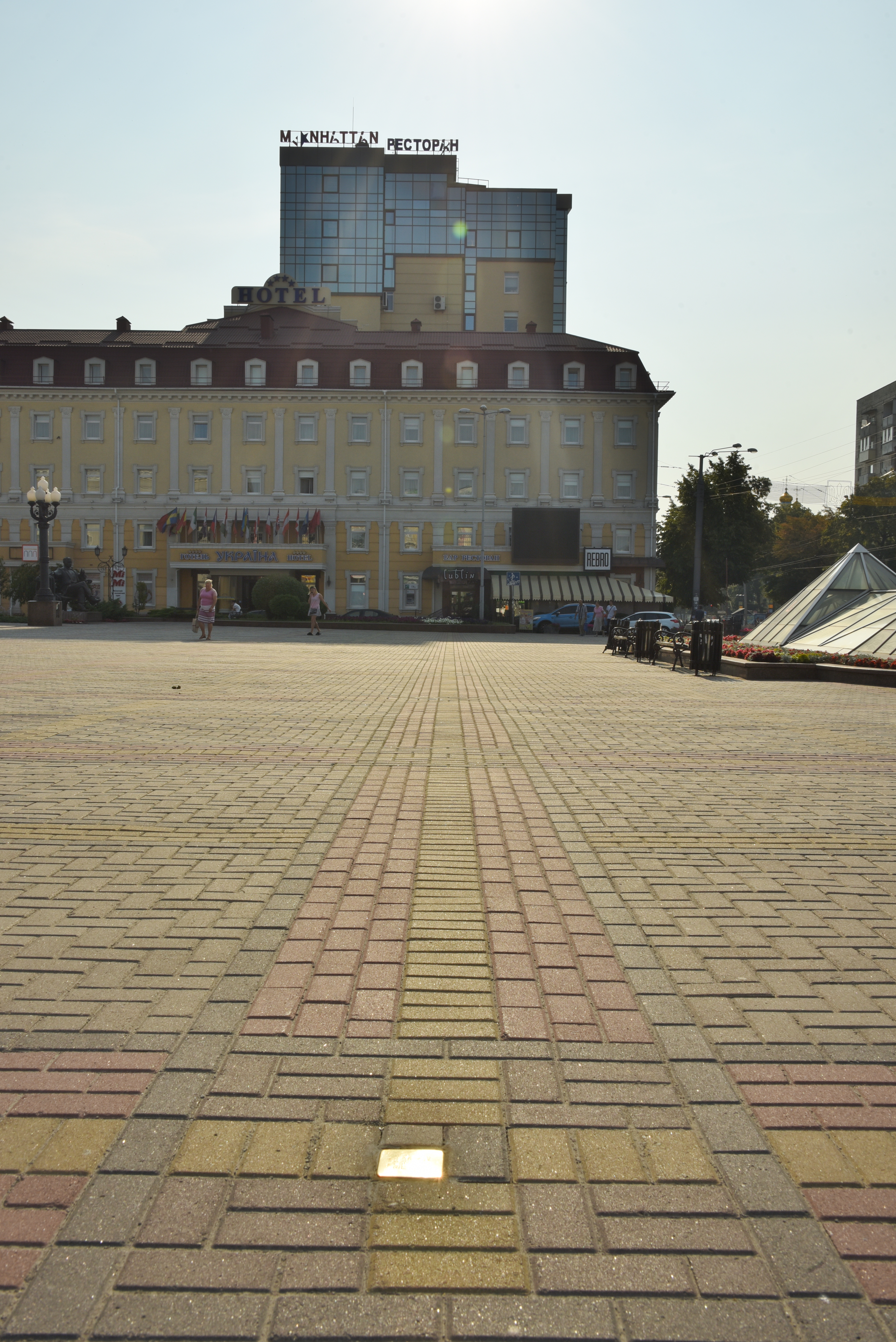 Stolperstein in Riwne